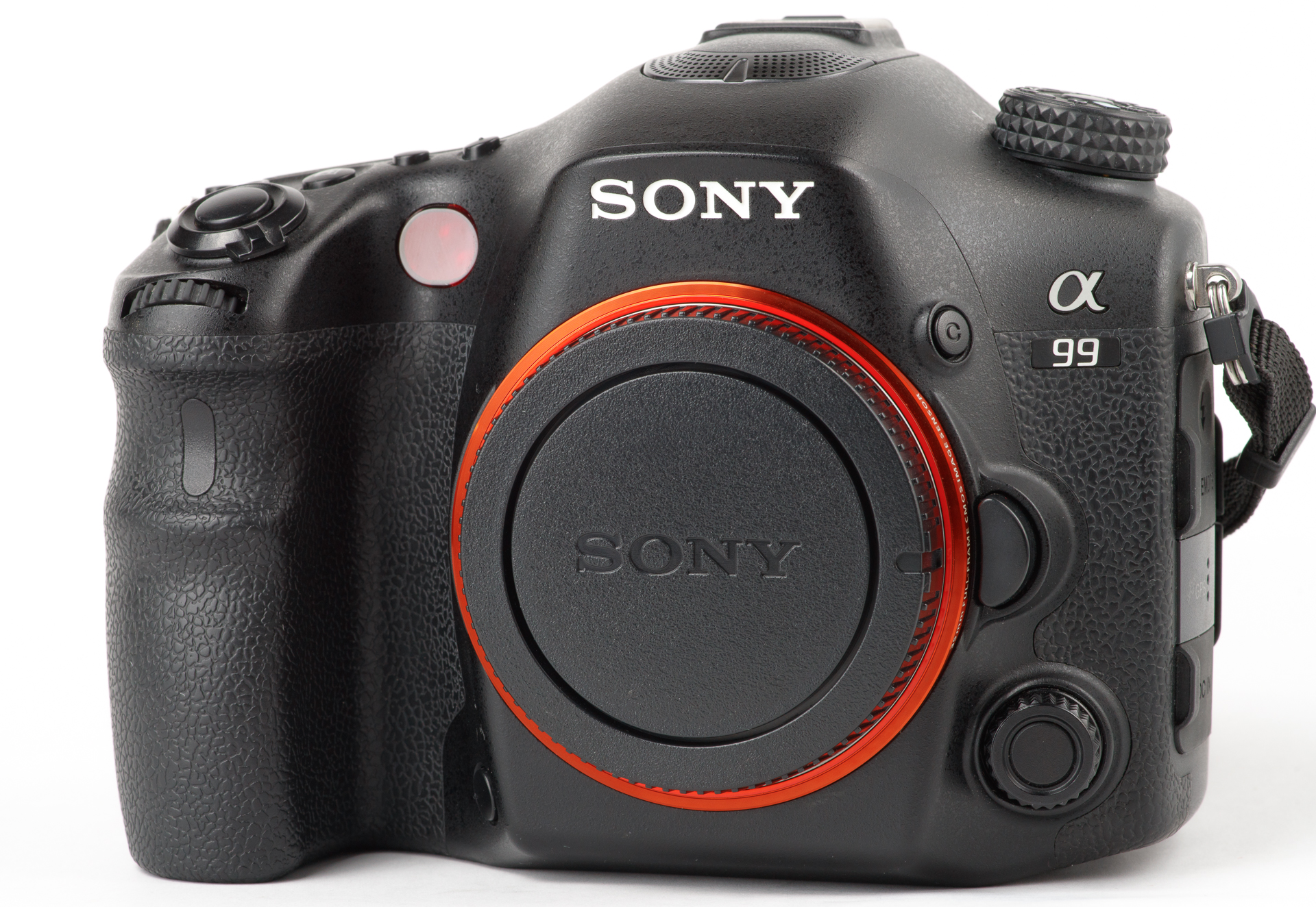 2代目 SONY Aマウント 35mmフルサイズ フラッグシップ機